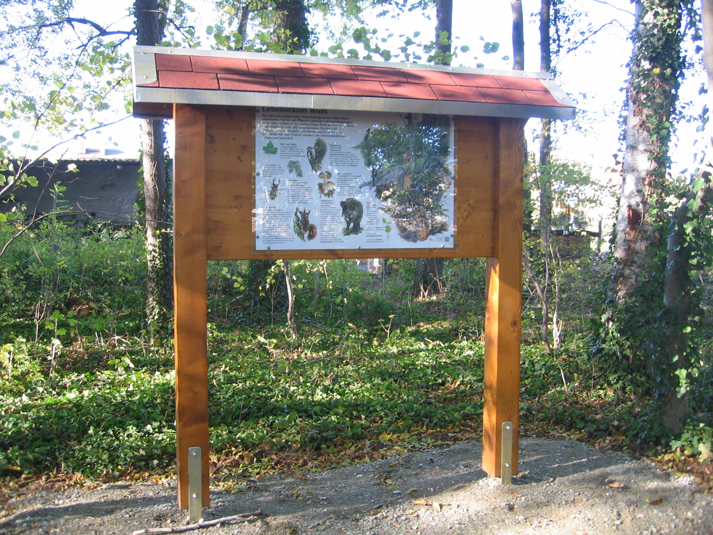 Geschwister-Scholl-Weg Ruhland, Informationstafel Tiere im Wald, östliche Ansicht; diese Informationstafel steht südlich der Sportplatzwiese; 2018 aufgestellt vom Bauhof, organisiert vom Verein für Heimatpflege